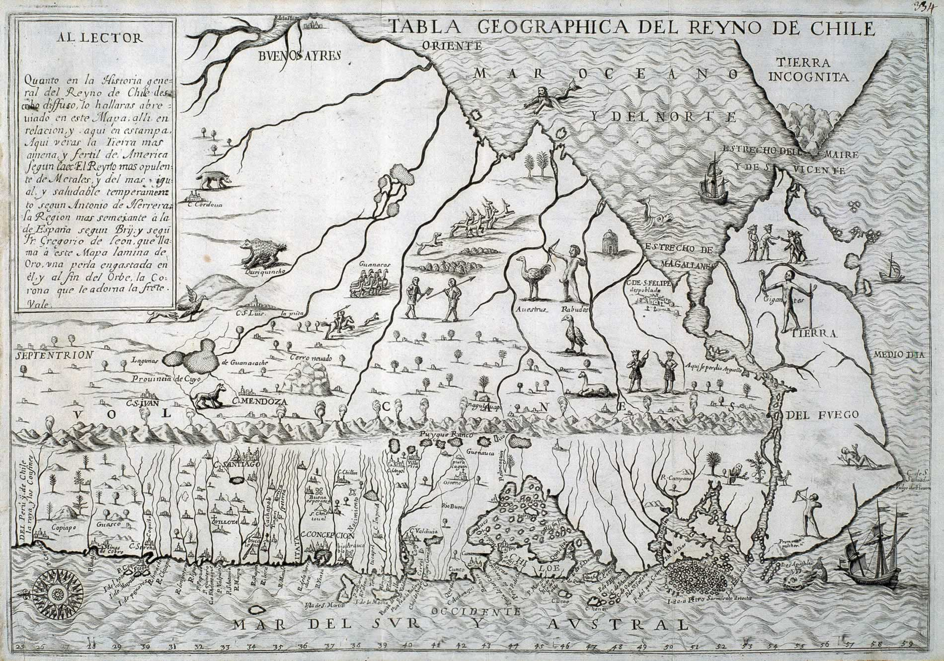 Mapa de la Historica relación del Reyno de Chile. Alonso de Ovalle (1603 - 1651). Cronista chileno